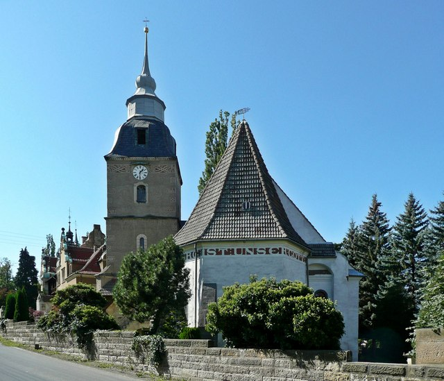 Cotta: Blick auf die Kirche